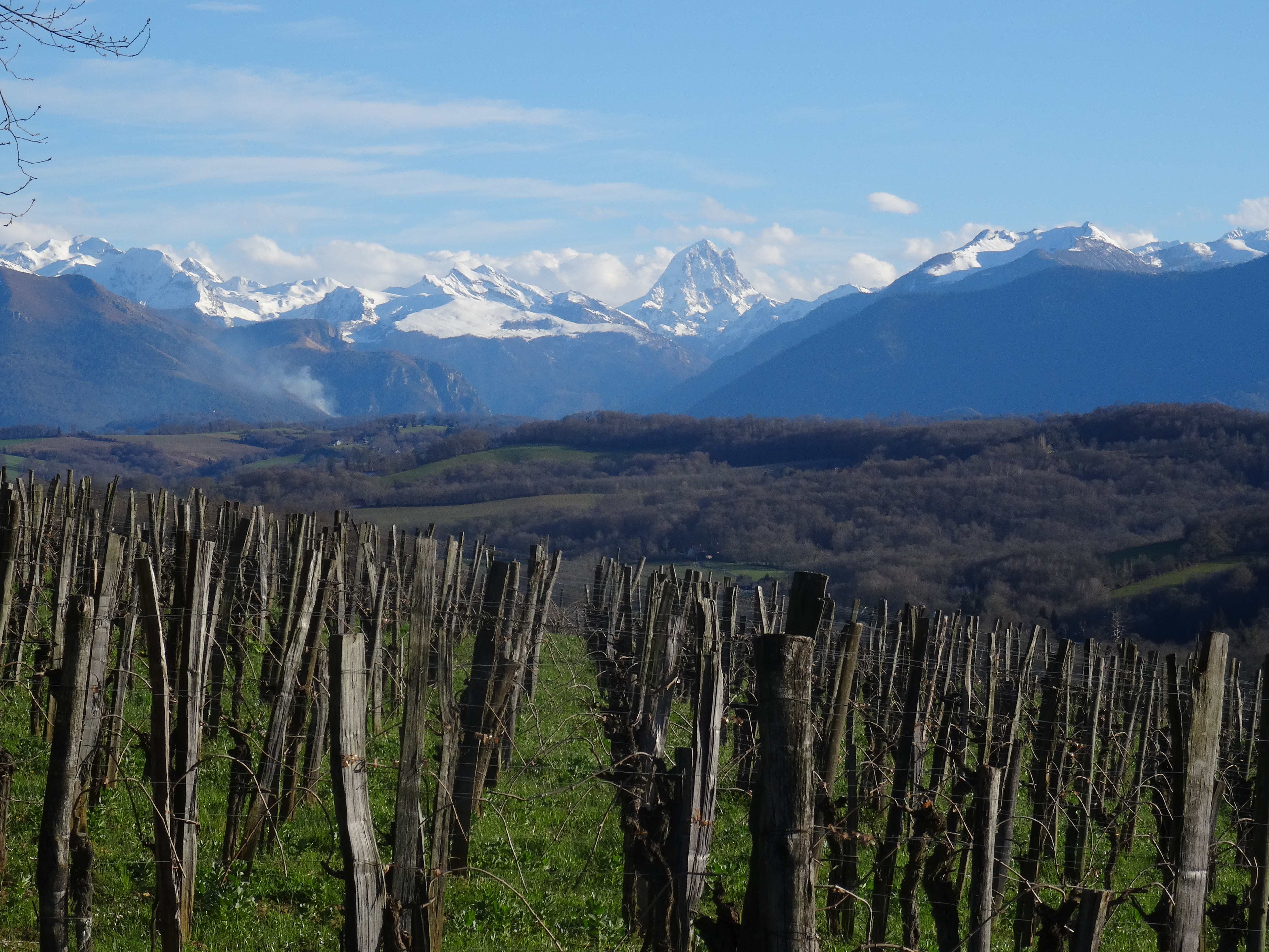 La région de l'entre deux gaves en Béarn. Photo prise sur les coteaux de Jurançon à Chapelle de Rousse